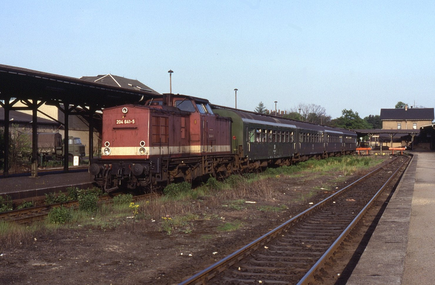 204.641 seen at Arnsdorf (b Dresden) on 24 May 1992.